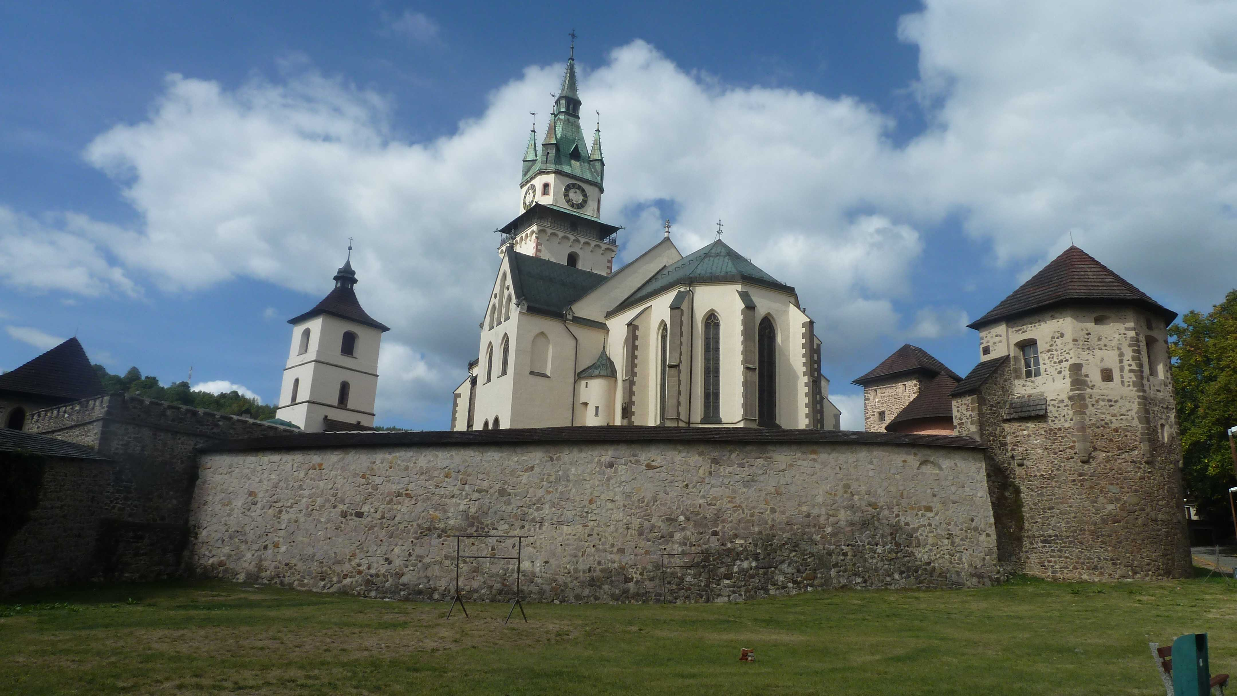 Pohľad na Kremnický hrad z východnej strany